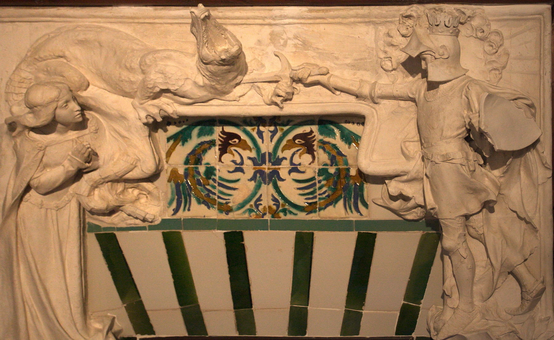 Maqueta d'una escultura amb una escena del poema "La Dida del Infant", obra d'Eusebi Arnau per al Principal de la Casa Lleó Morera (Barcelona) de Lluís Domènech i Montaner (1902). La maqueta de guix es conserva a la casa-museo de Domènech i Montaner a Canet de Mar.